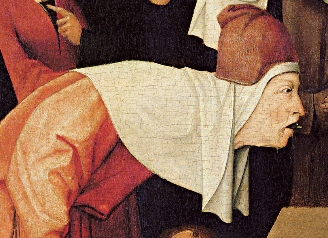 Détail de L'Escamoteur de Jérôme Bosch